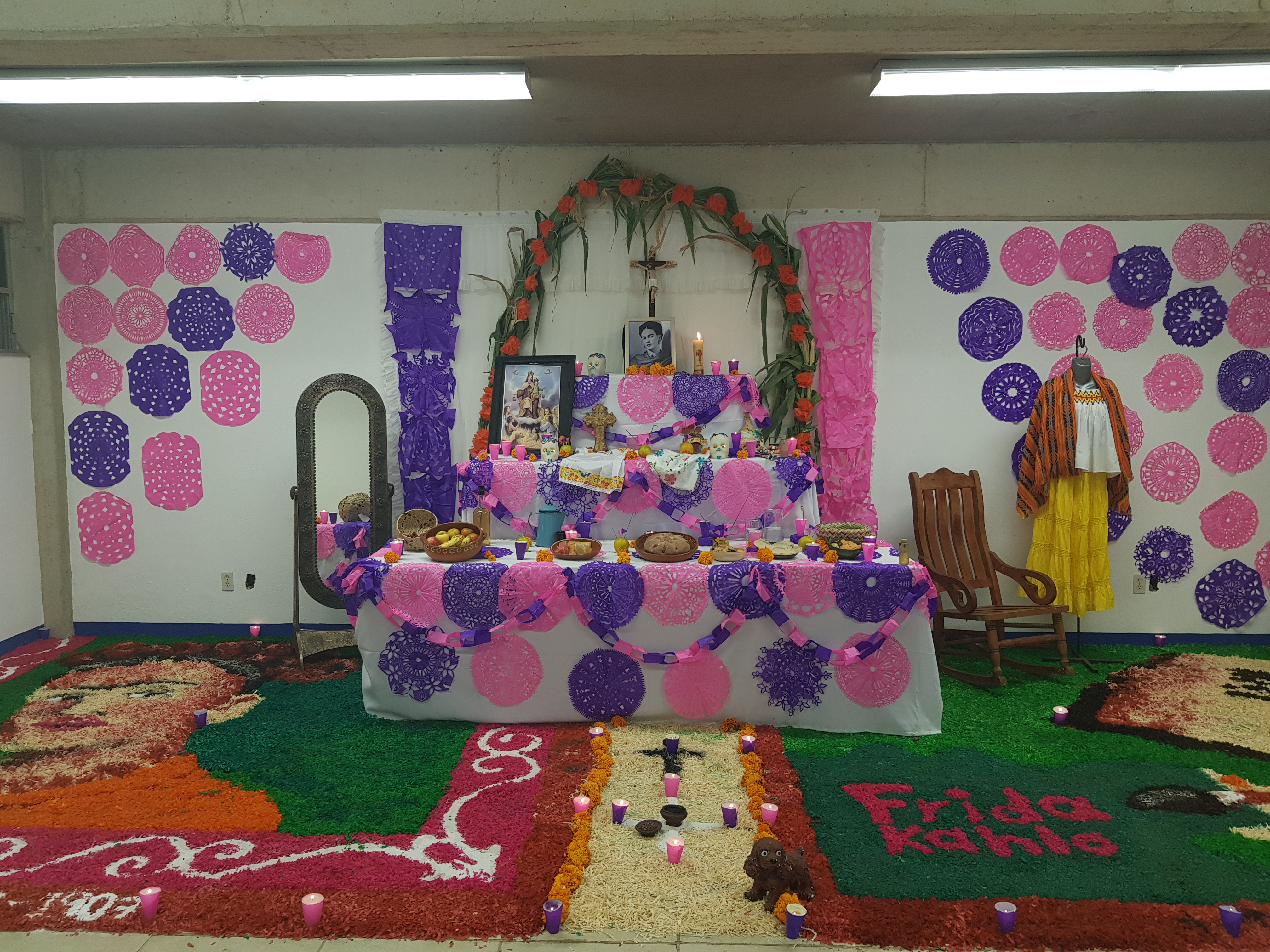 Altar de Frida Kahlo elaborado por alumnos de la U. de G.